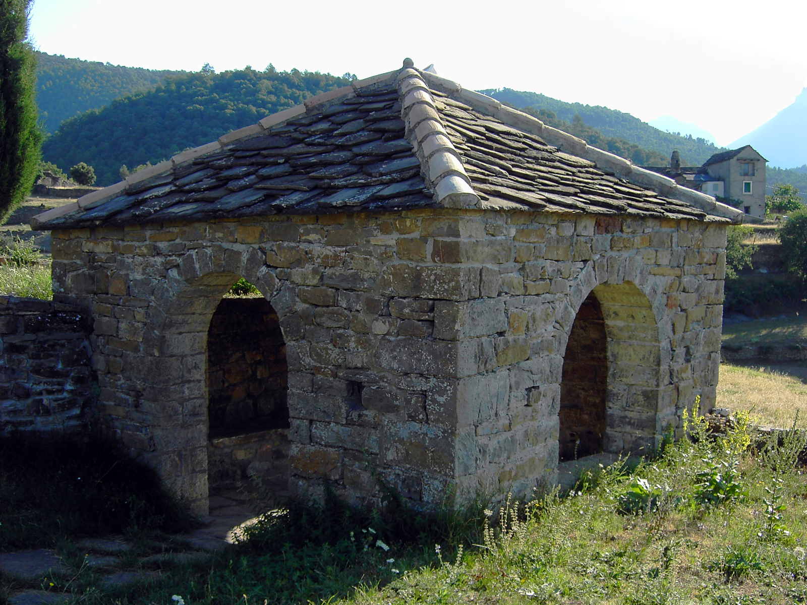 Esconjuradero de San Vicente de Labuerda (Huesca).